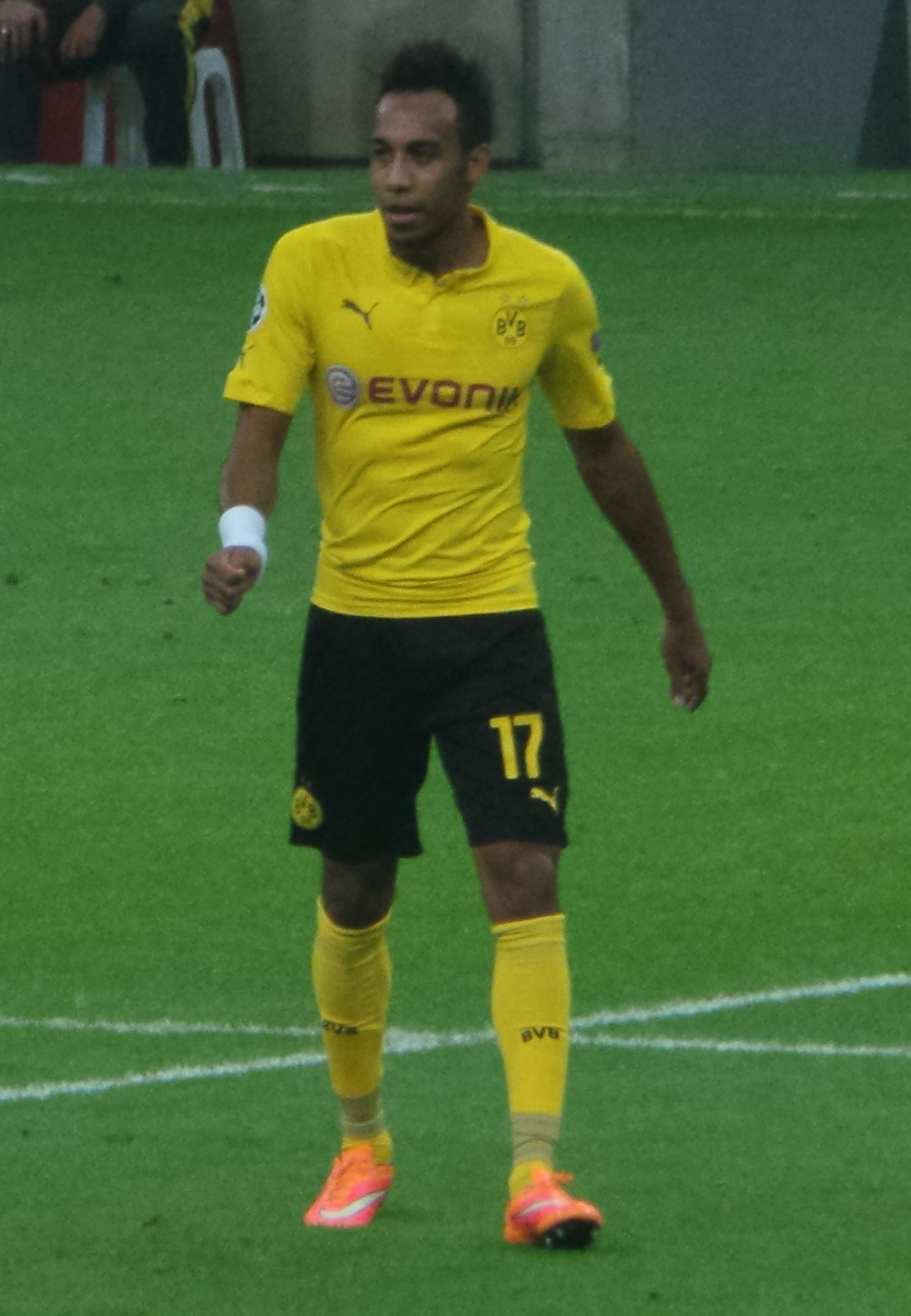 Pierre-Emerick Aubameyang against PandaFX